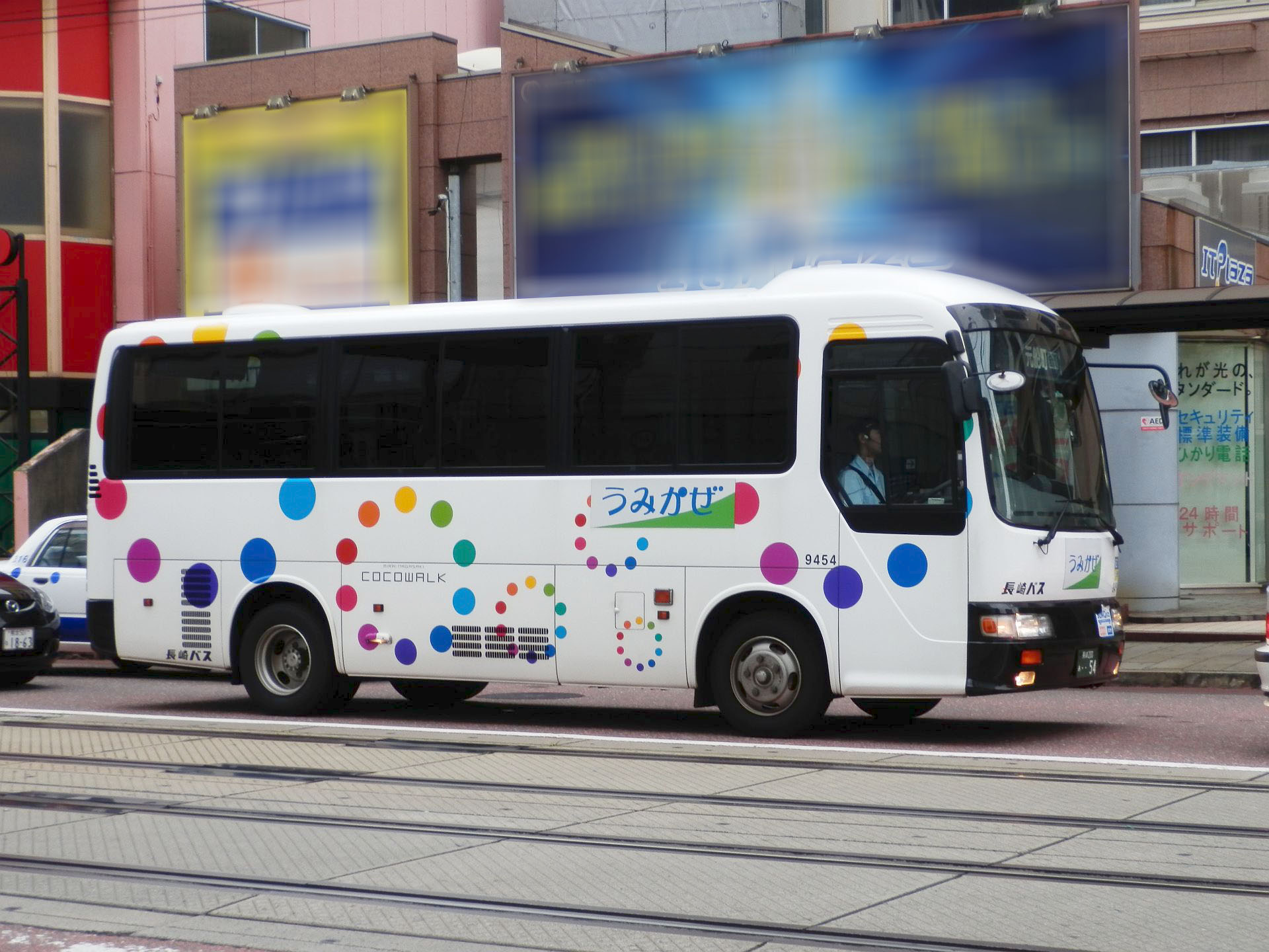 長崎自動車 9454